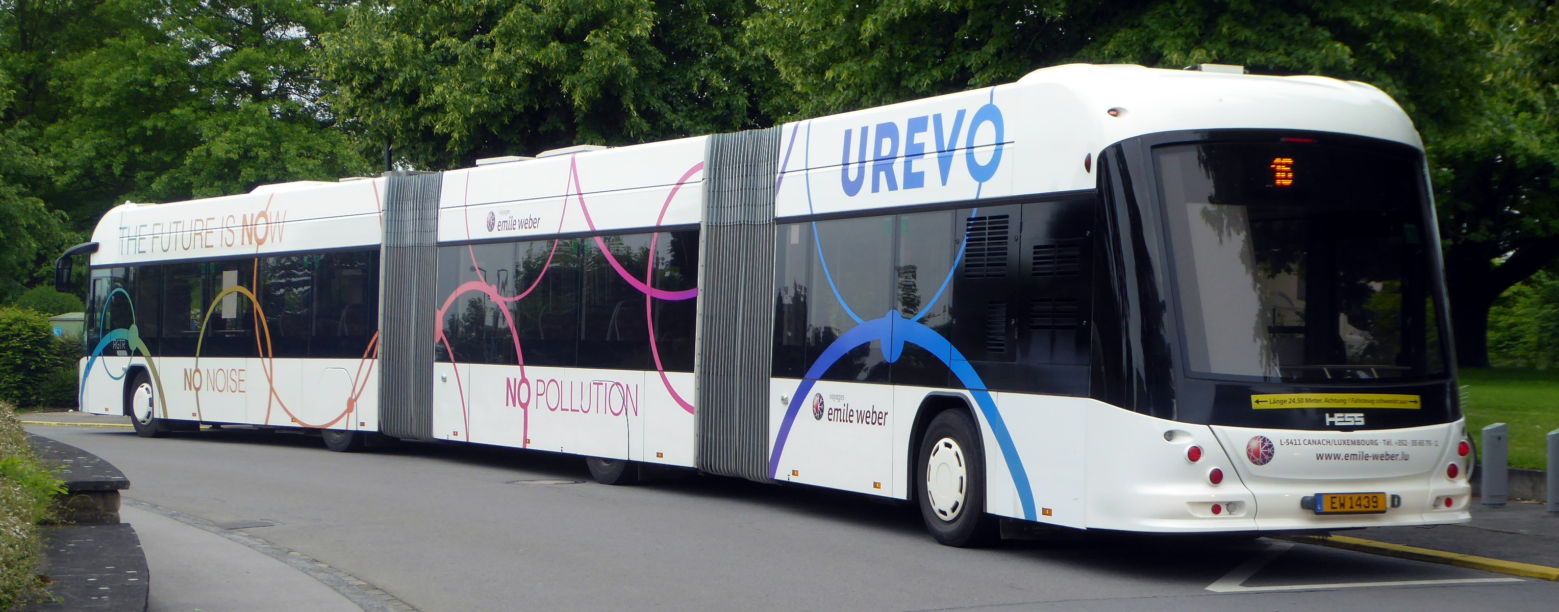 Hess-Doppelgelenk-Hybridbus in Hesperingen (LU).